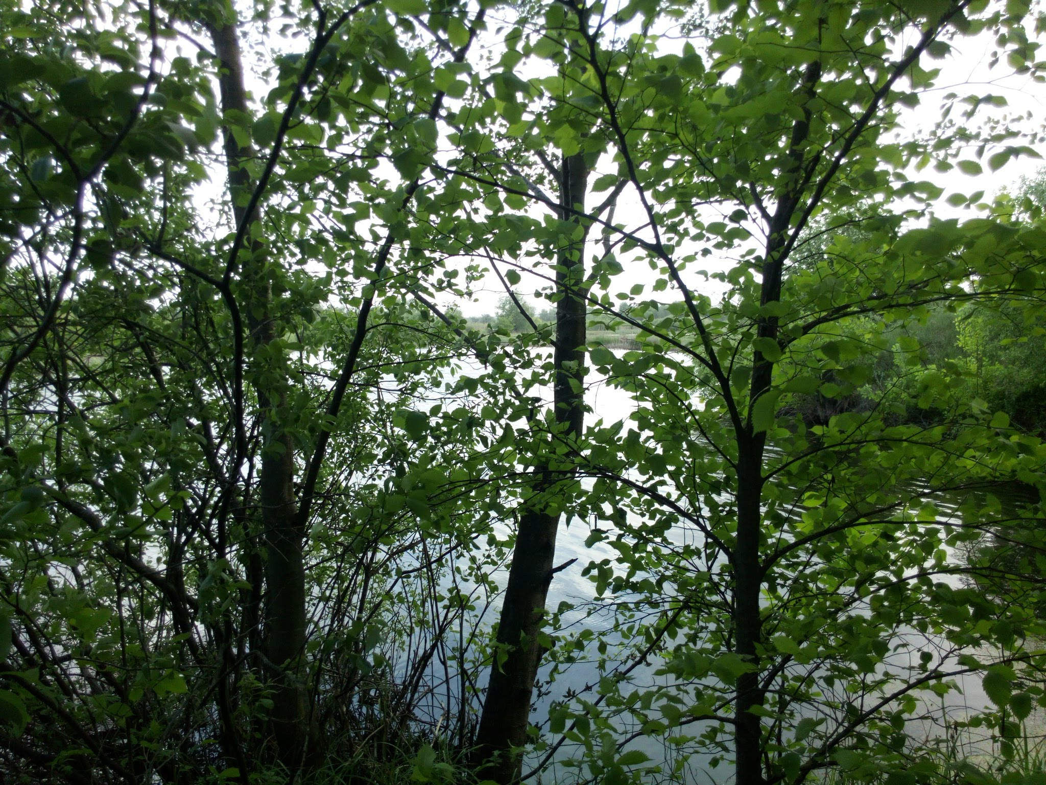 Артополот, Лохвицький р-н, між селами Піски, Пісочки та Гаєвщина, охоплюючи долини р. Сули та її лівої притоки — р. Артополот, кв.1 уч. 12, діл. 11,13, кв.1 уч. 14 діл.14, кв.1 уч.17 діл. 23, кв.3 уч. 24, діл.3, кв.3 уч. 30 діл. 19, кв. 3 уч. 31 діл.7